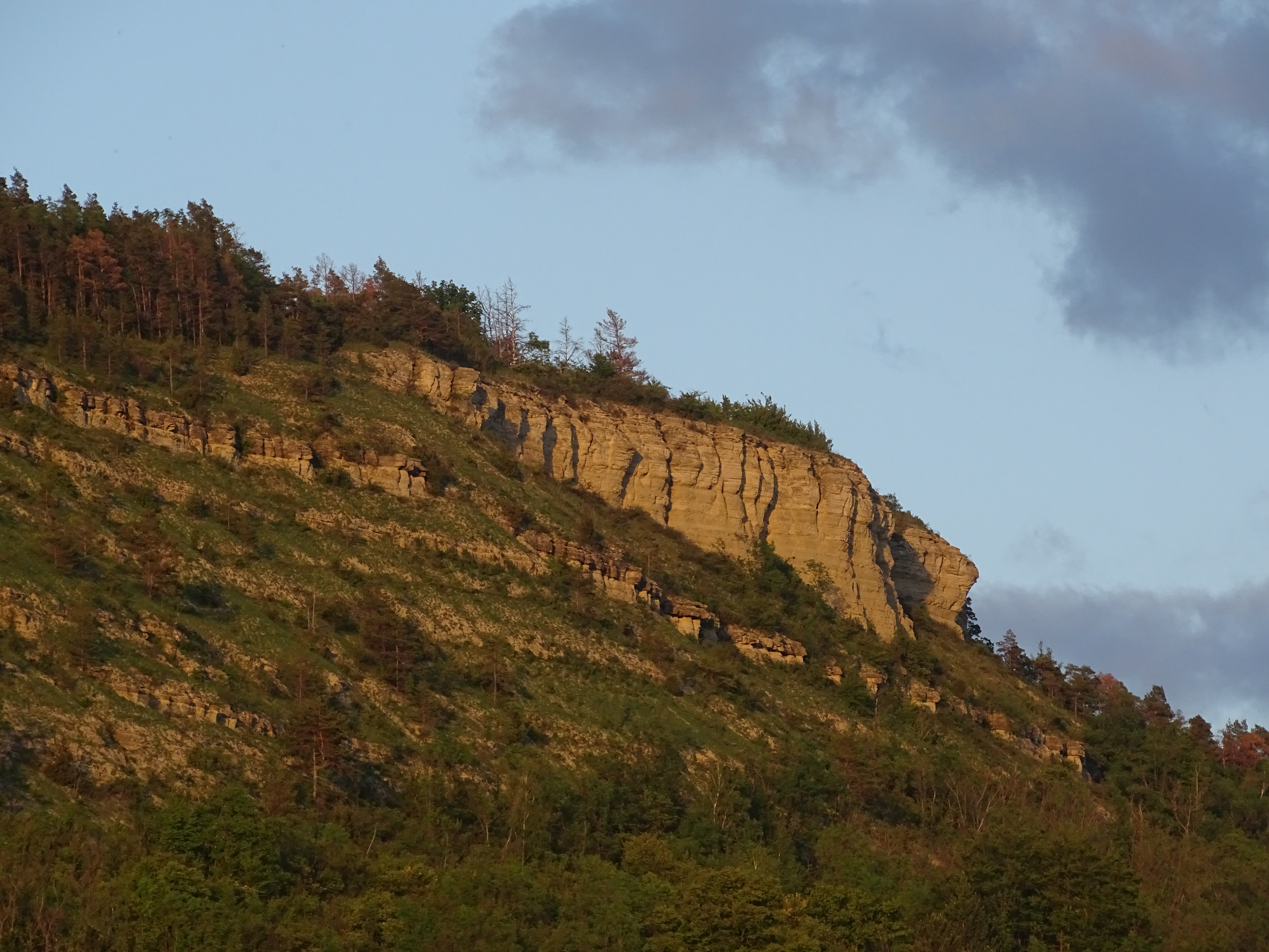 Steilhang des Johannesbergs Jena-Lobeda in der Abendsonne von Wöllnitz aus gesehen